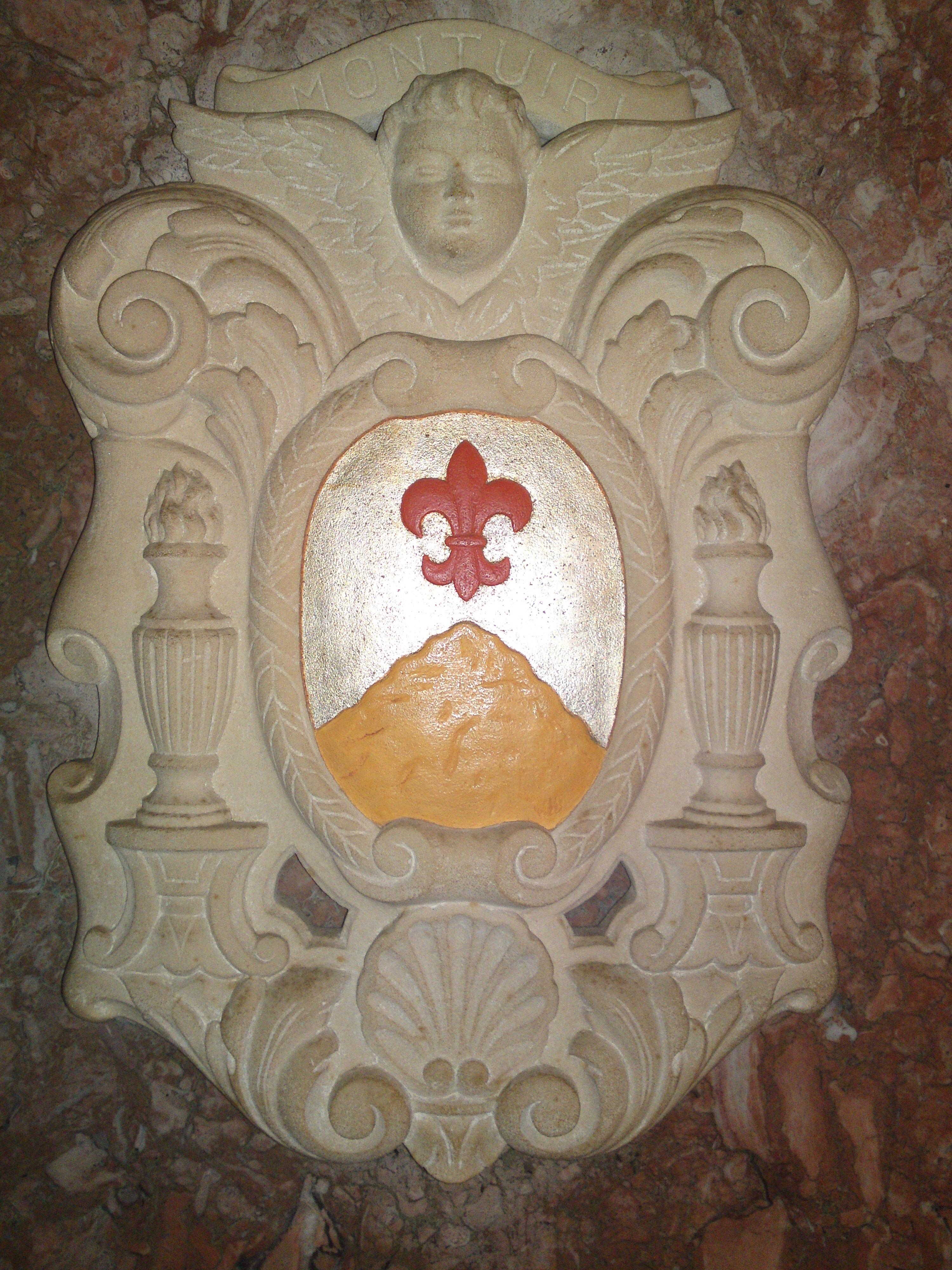 Escut de la vila de Montuïri al cambril de la Mare de Déu de Lluc (Santuari de Lluc, Mallorca)